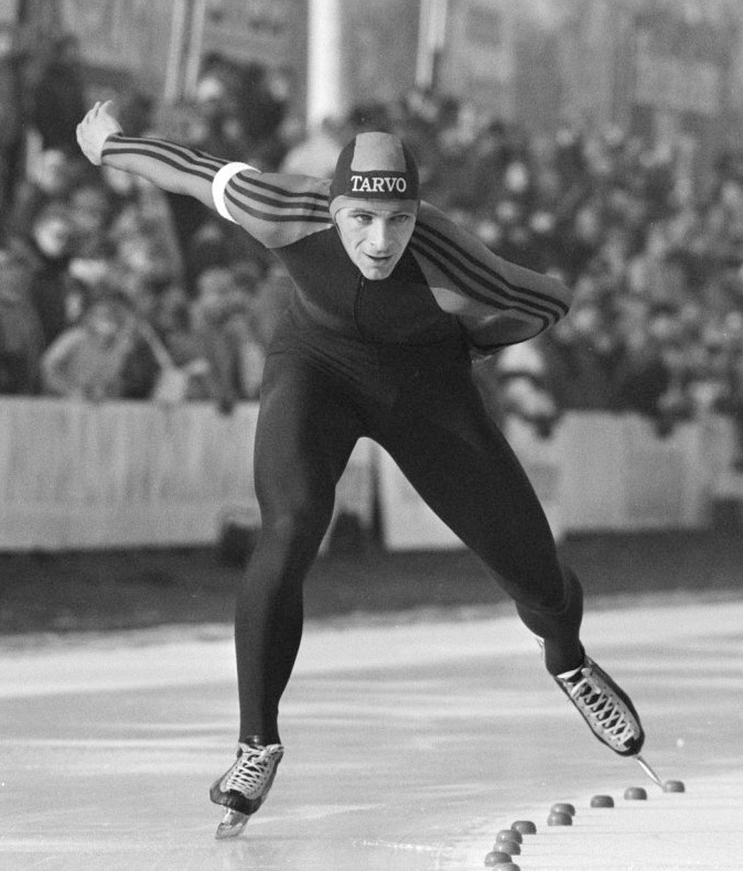 Heerenveen, landenwedstrijd, Nederland, Noorwegen, Zweden schaatsen voor heren; Frits Schalij in actie (1500 m).